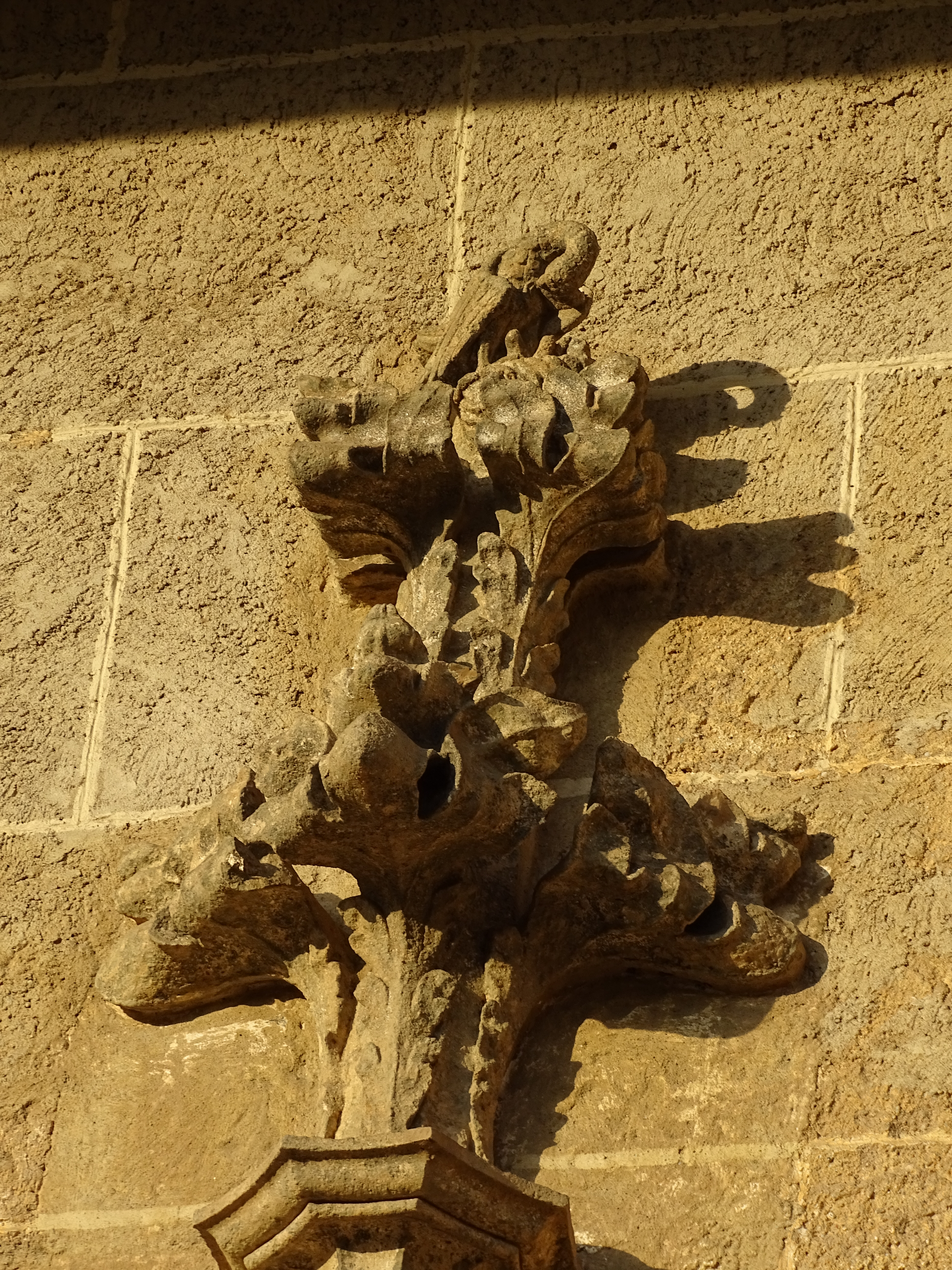 Eine Darstellung eines Pelikans der seine Jungen mit dem Blut aus seiner Brust füttert über dem Südportals der Wallfahrtskirche Maria Straßengel